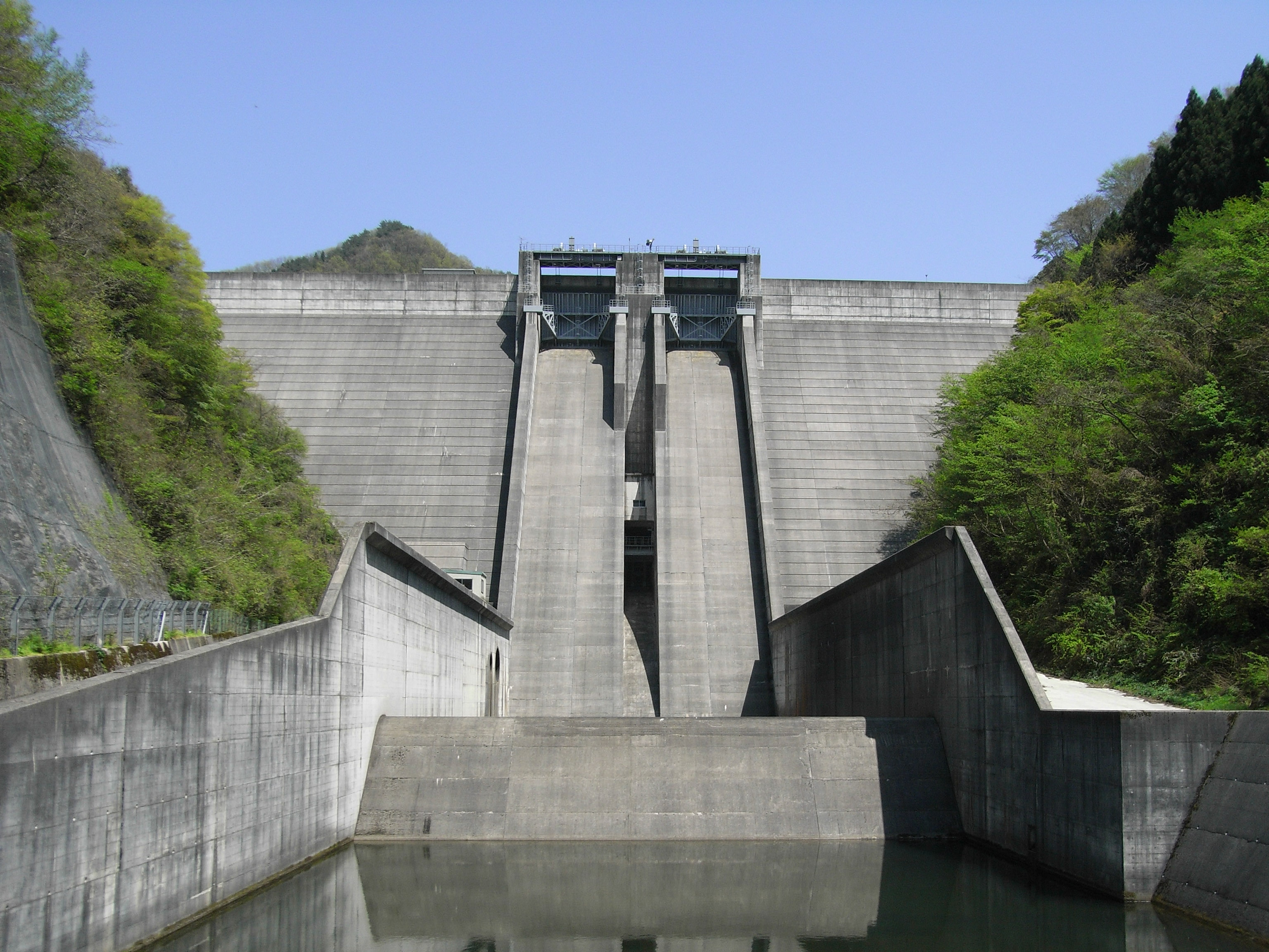 Dam